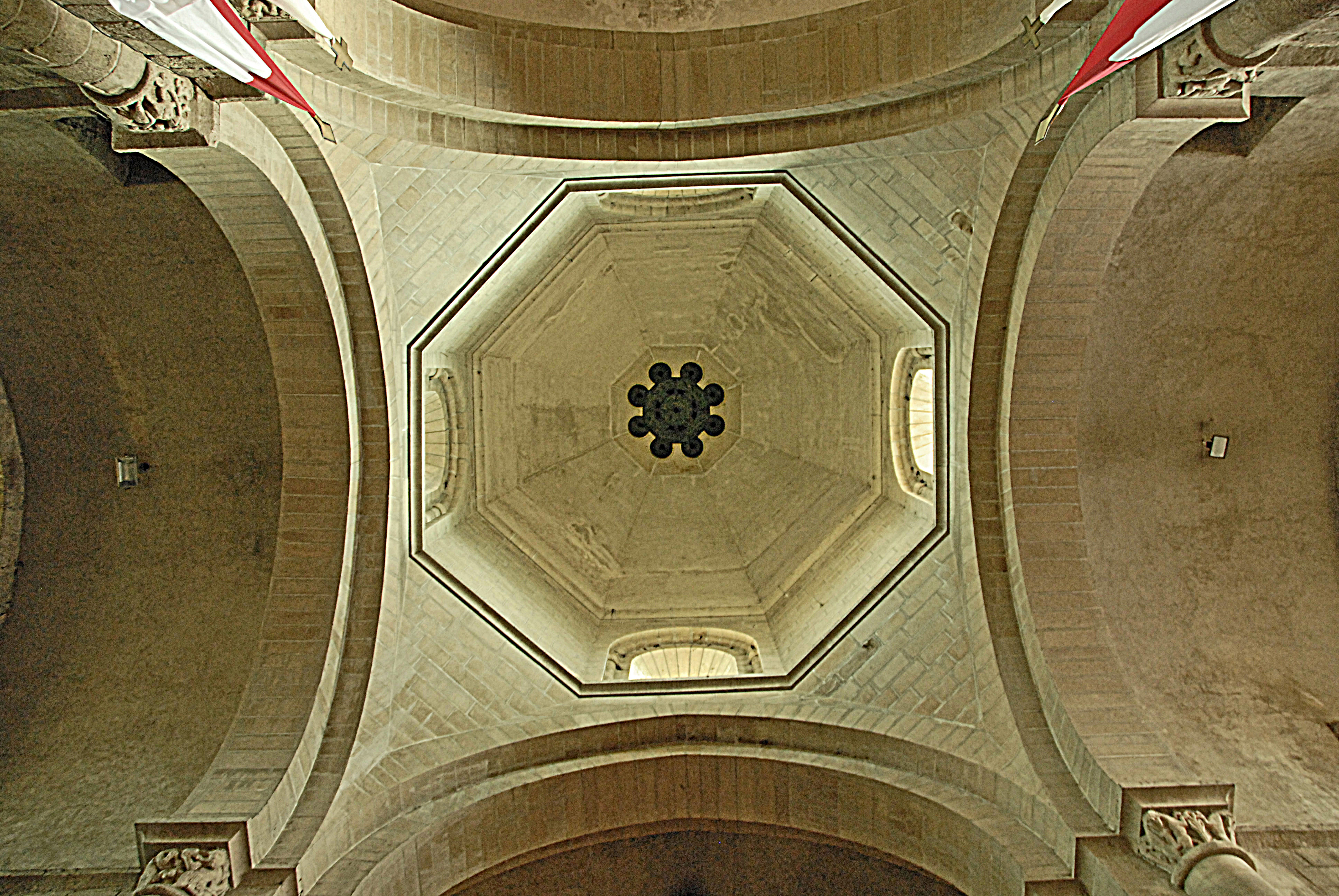 St-Junien. Vierungskuppel von unten